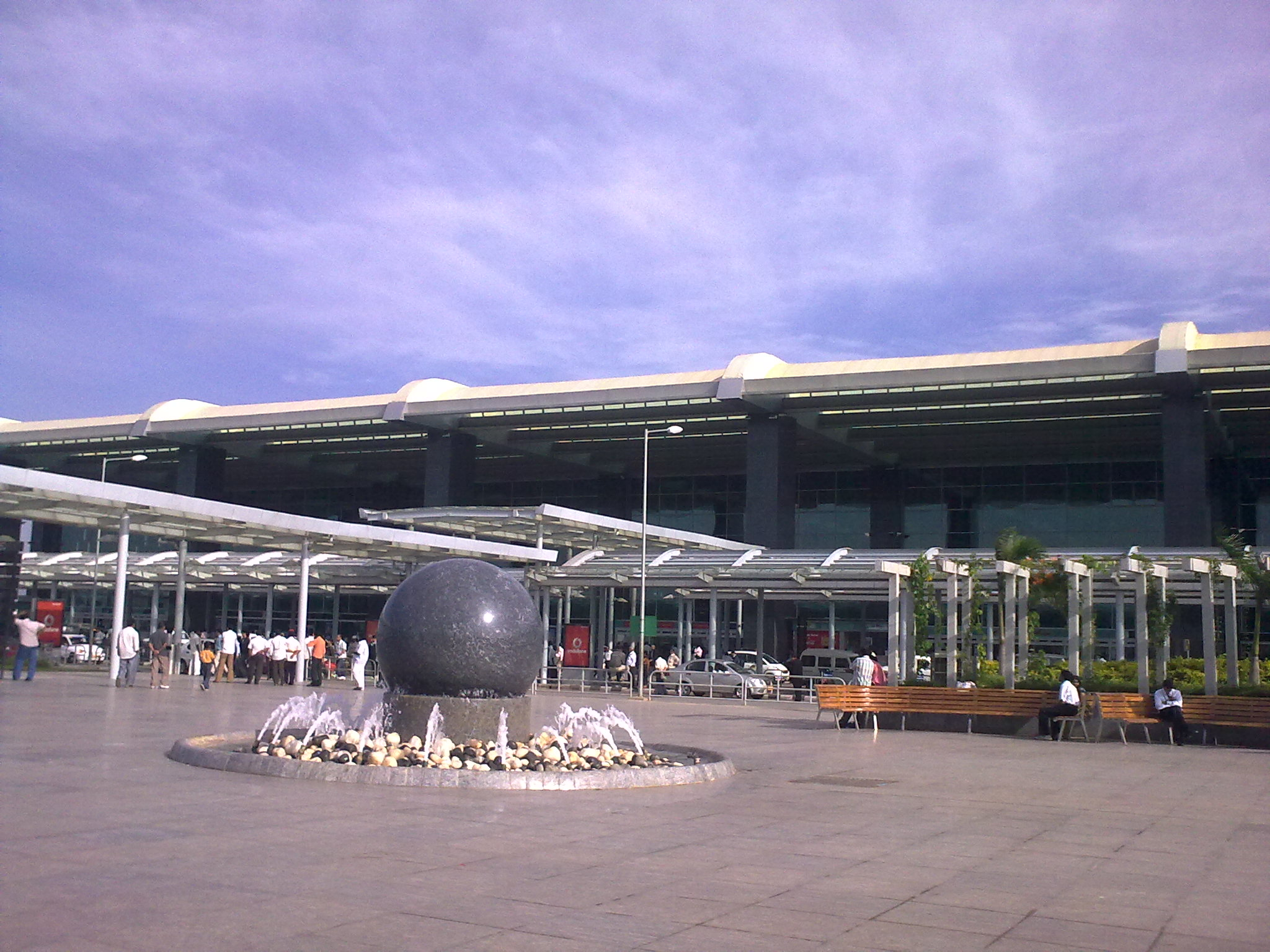 ബെംഗളൂരു അന്താരാഷ്ട്രവിമാനത്താവളം ടെർമിനൽ